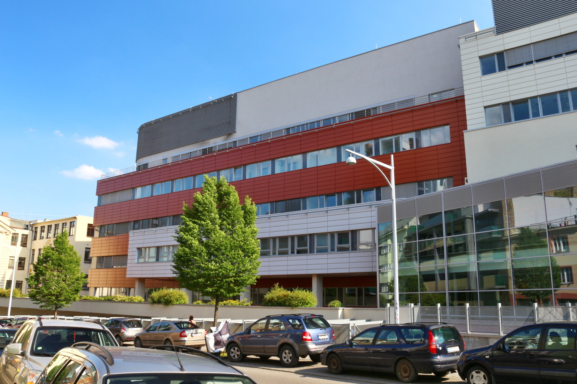 Faklutní nemocnice u sv. Anny v Brně